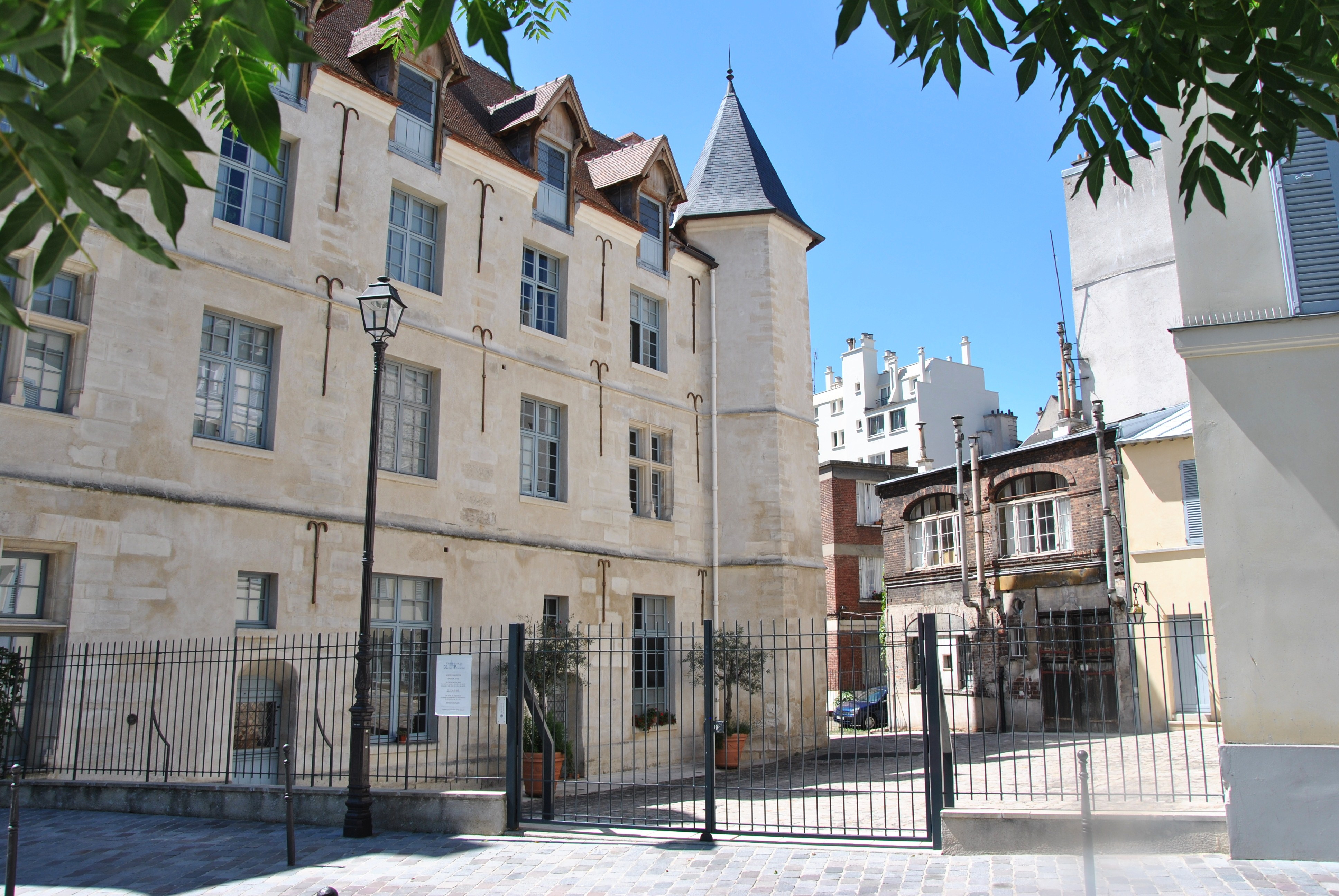 Château de la Reine Blanche, Rue Gustave-Geffroy, Paris 13e